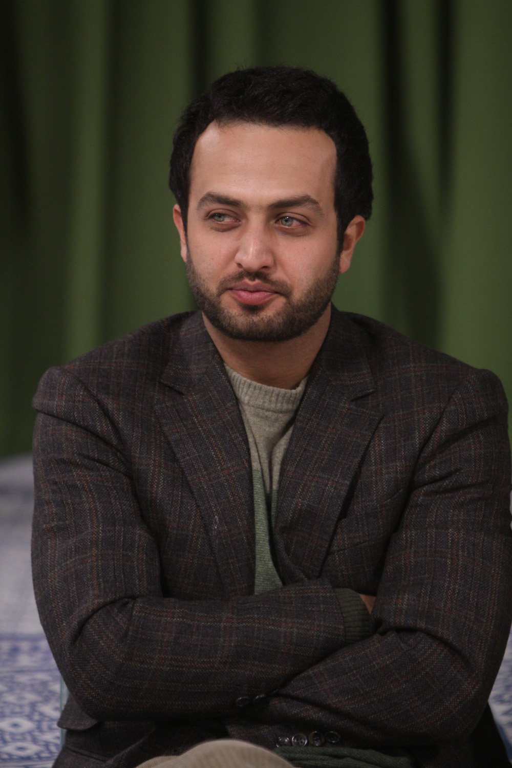 مصطفی زمانی در دیدار هنرمندان مجموعه تلویزیونی یوسف پیامبر با سید علی خامنه‌ای